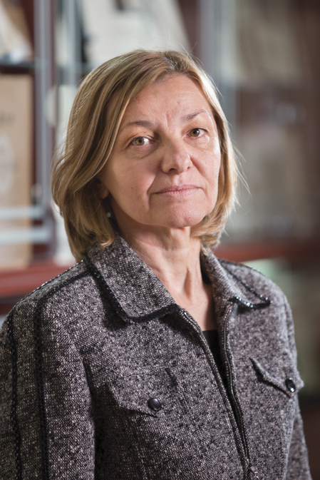 Српски (ћирилица): проф. др Раденка Цветић